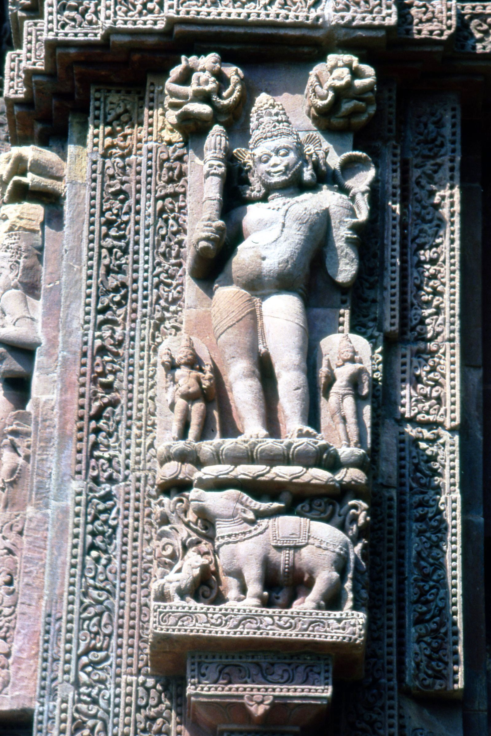 Siglo XI, Templo Rajarani/Templo Indreswara, Detalle de una escultura de Iama el dios hinduista de la muerte, quien aparece montado sobre un toro mientras sostiene en una mano una danda (vara). Bhuvanesvar, Orissa, India.